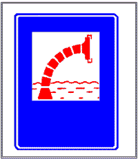 Знак «Пожежне вододжерело» в Україні